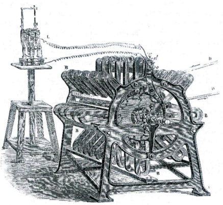 La machine magnetoélectrique de L'.AIIiance alimentant une lampe a arc. Invention du professeur Floris Nollet. Gravure extraite de LEFEVRE Julian, Dictionnaire d'electricite, Paris, 1895, p. 451, fig. 516.